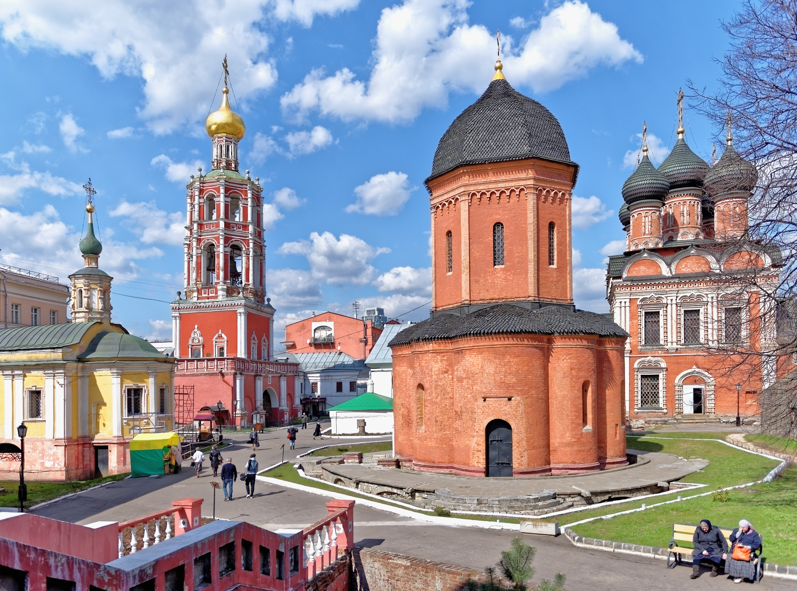 Высоко-Петровский монастырь. Современный вид.